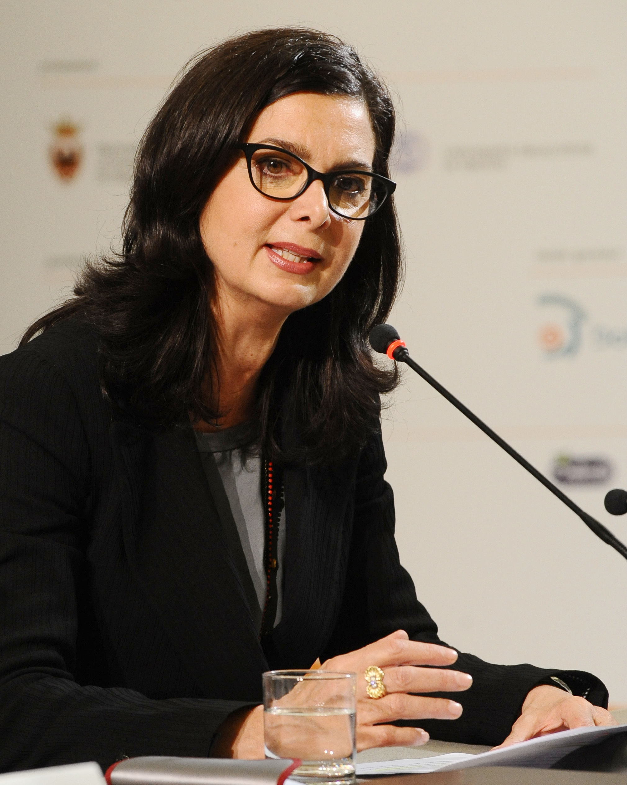 Laura Boldrini al Festival dell'Economia di Trento.